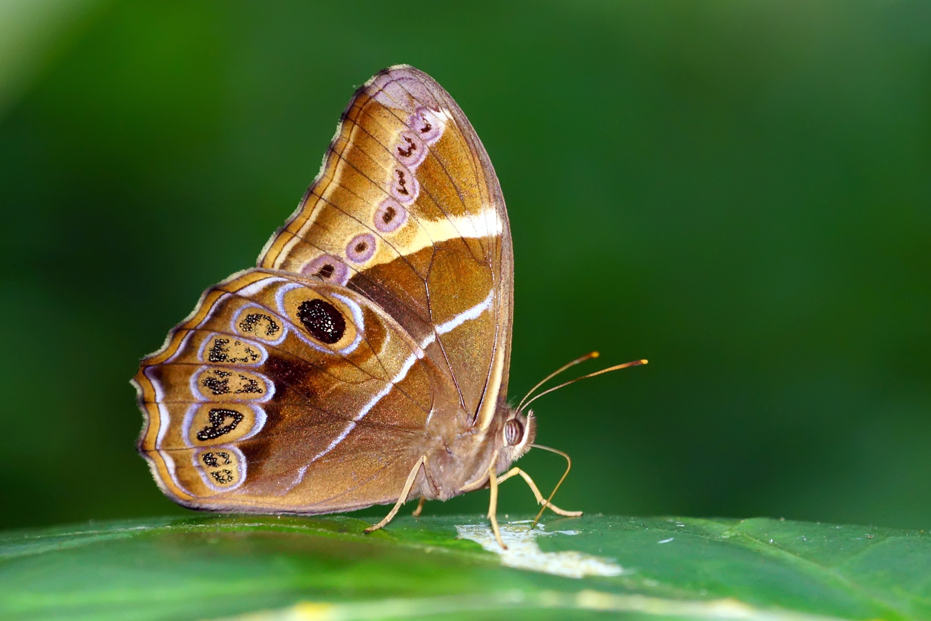 長紋黛眼蝶Lethe europa pavida